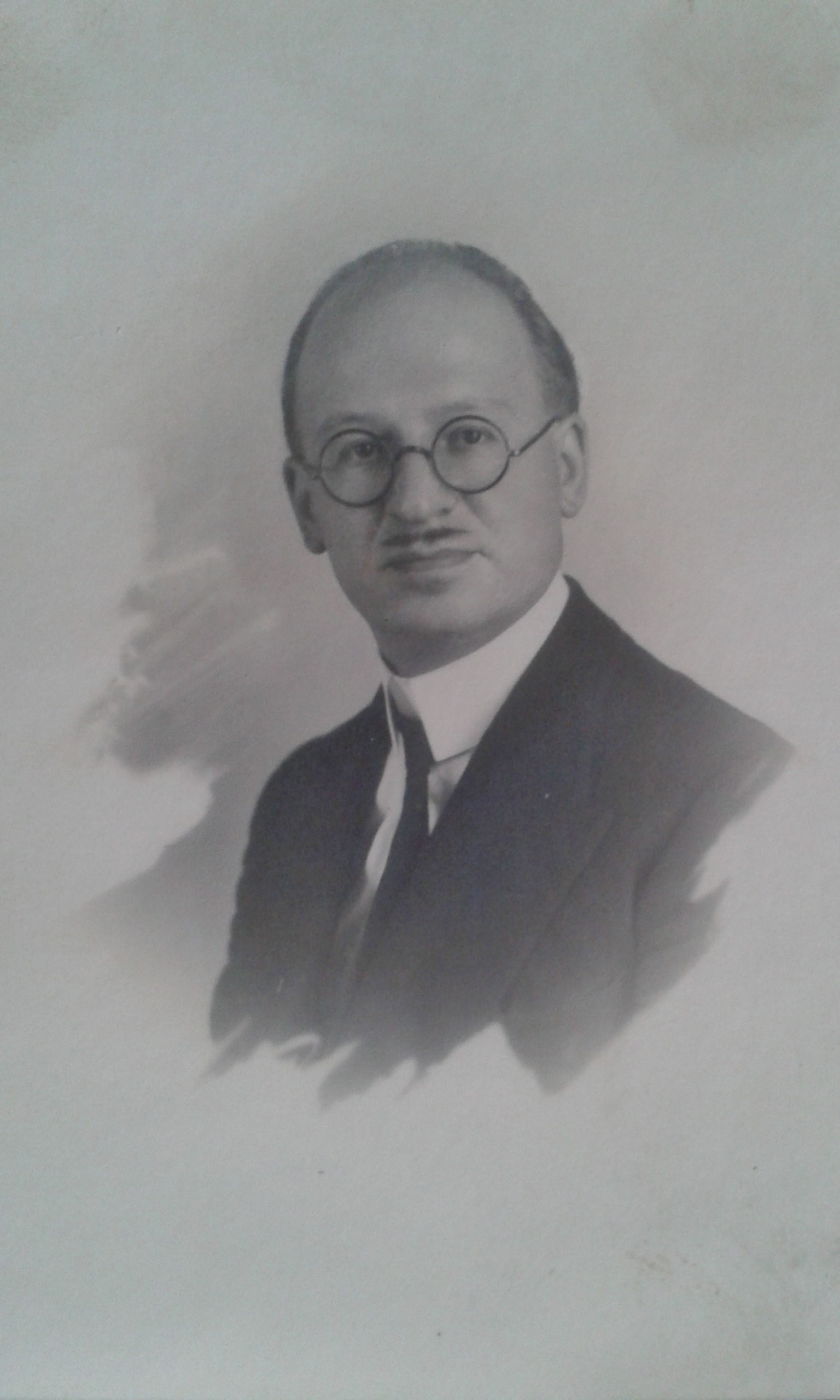 Mariano Rosati